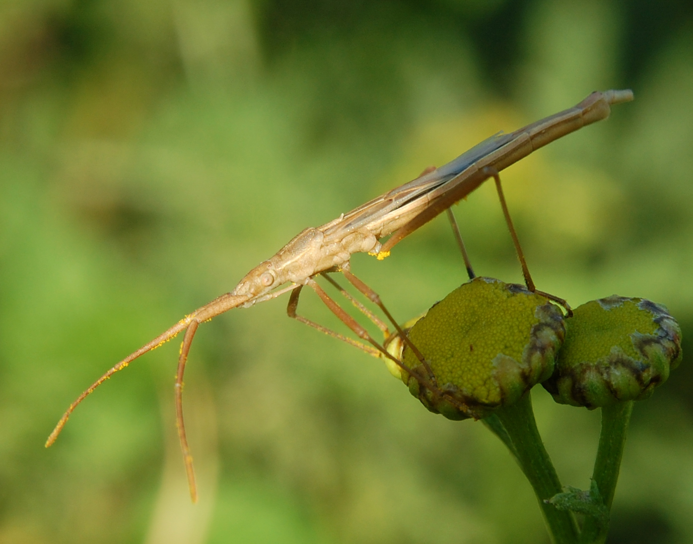 Chorosoma schillingii (Rhopalidae). Berlin, Bezirk Pankow, auf trockener Brache